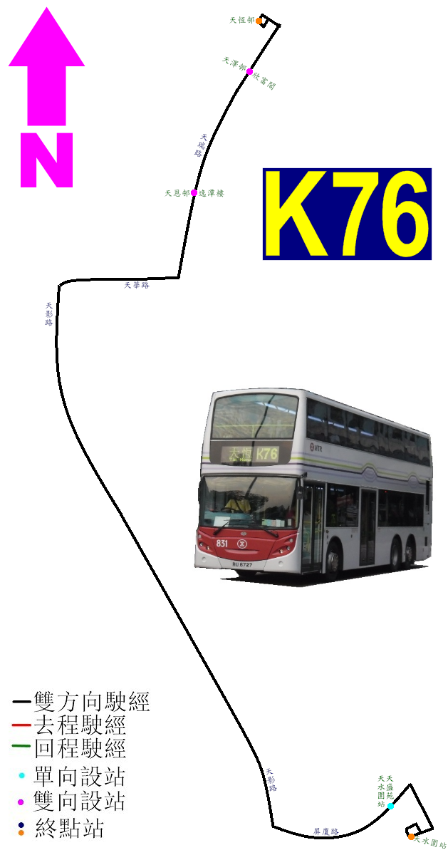 中文（香港）: 港鐵巴士K76線的地圖式路線圖